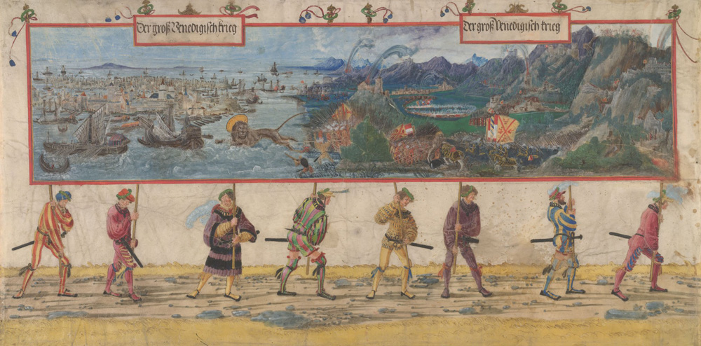 fol. 68 von Der Triumphzug Kaiser Maximilians